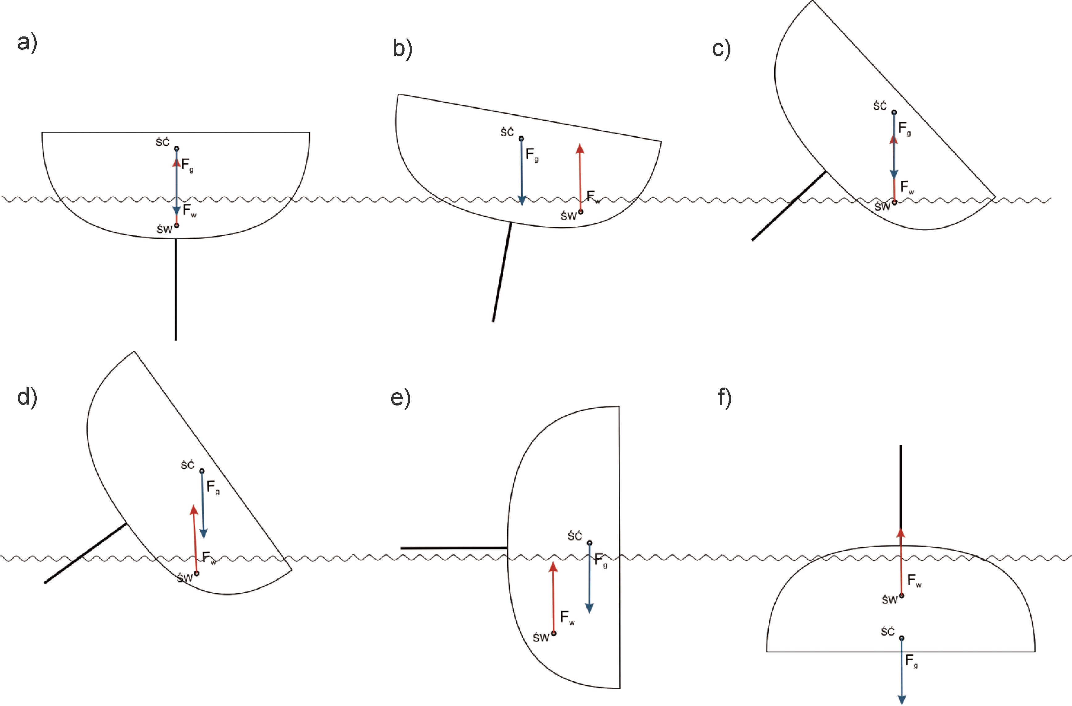 Kolejne etapy wywracania jachtu mieczowego